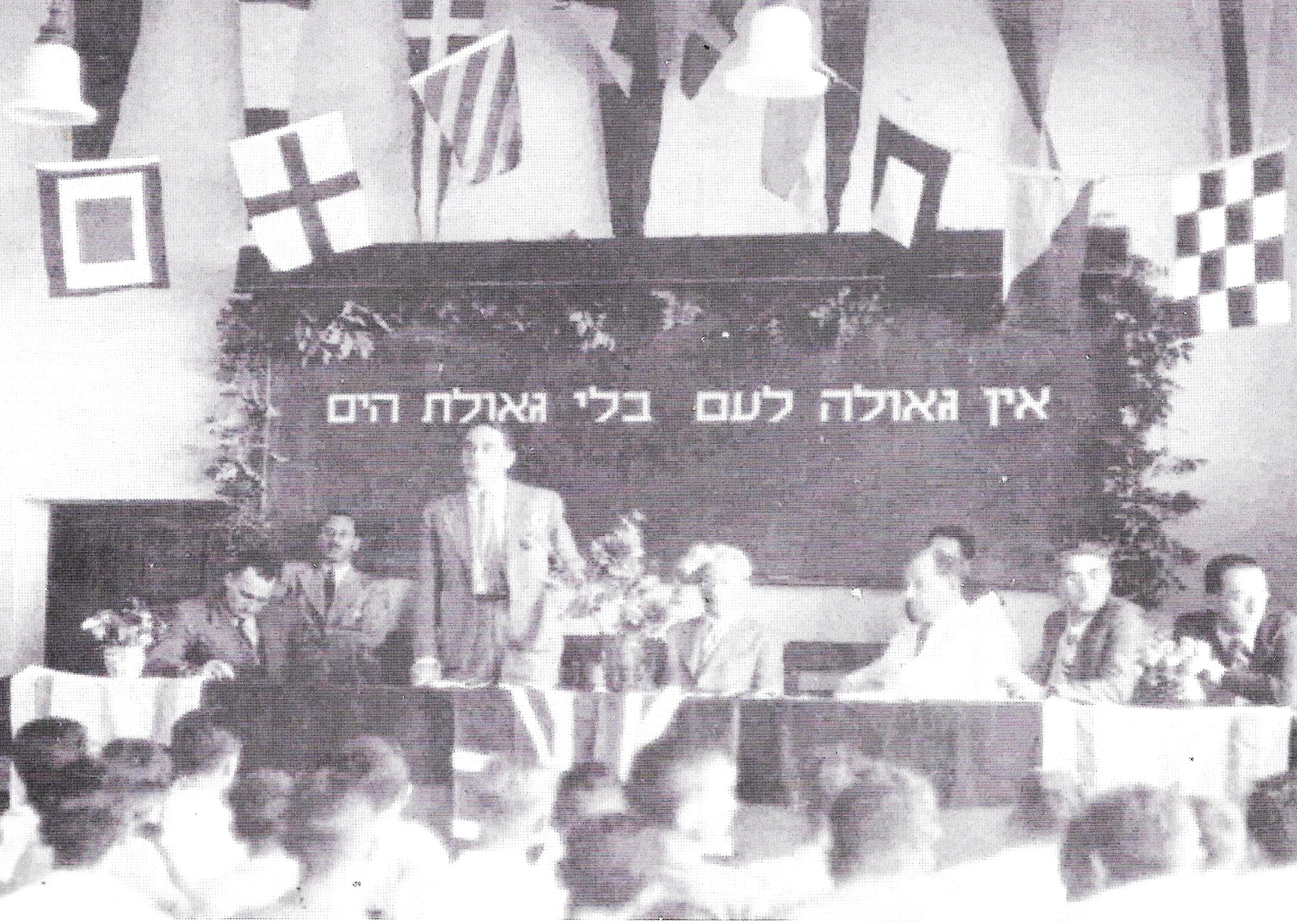 בימת הנואמים בטקס פתיחת הלימודים בבית הספר הימי 18 באוקטובר 1938